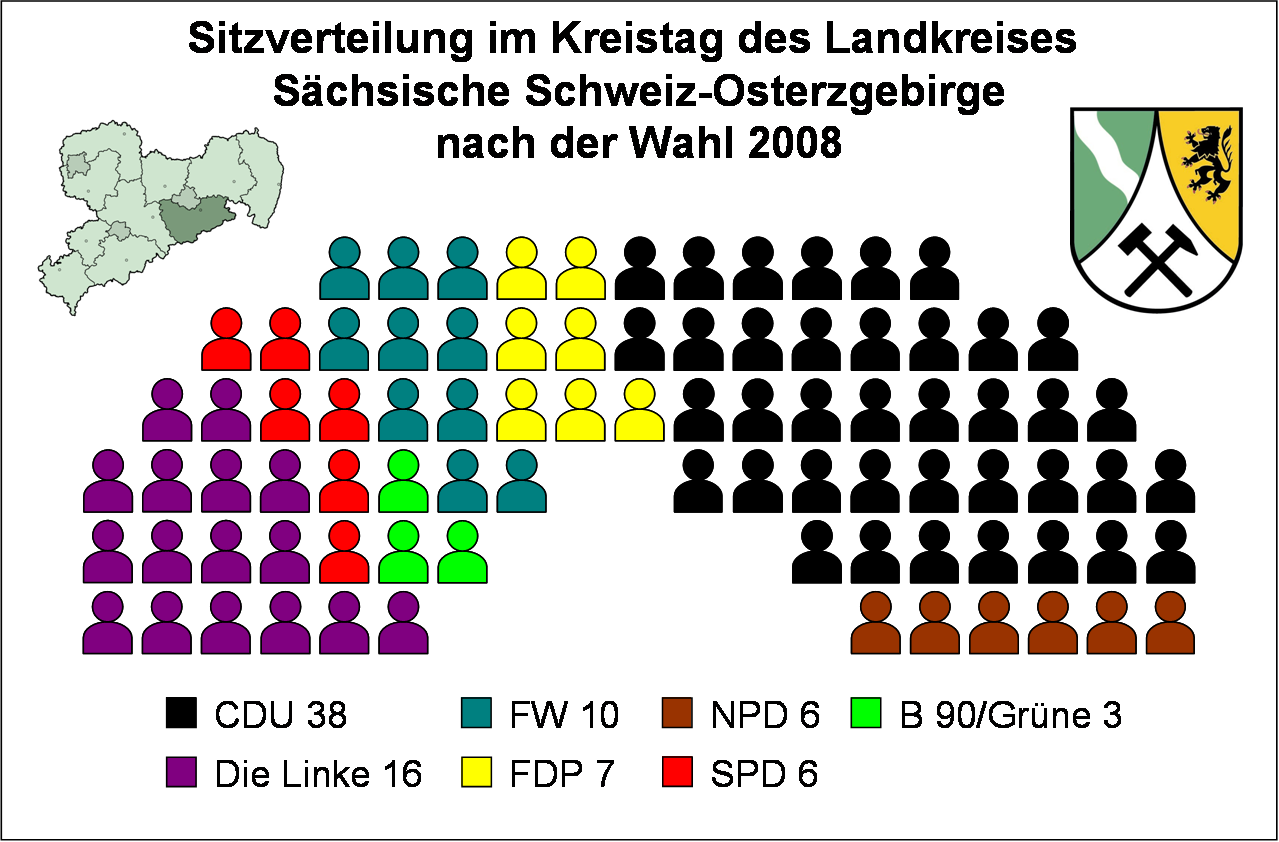 Sitzverteilung im Kreistag des Landkreises Sächsische Schweiz-Osterzgebirge nach der Wahl vom 8. Juni 2008